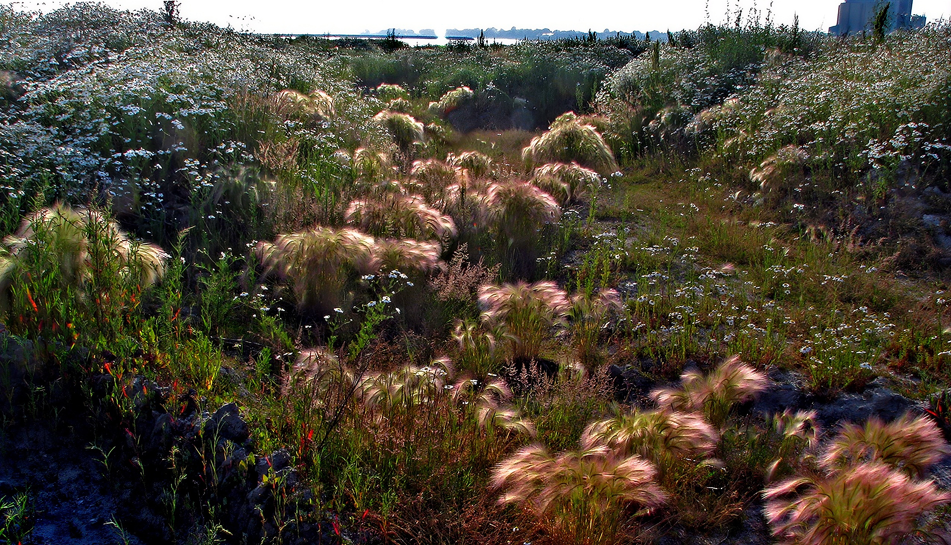 Ruderatmark vid industriområde, Världen ände i Ystad.